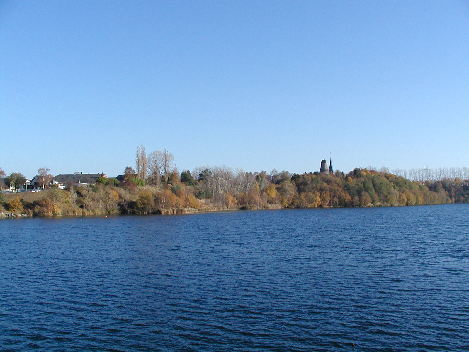 Impressionen vom Kreidesee